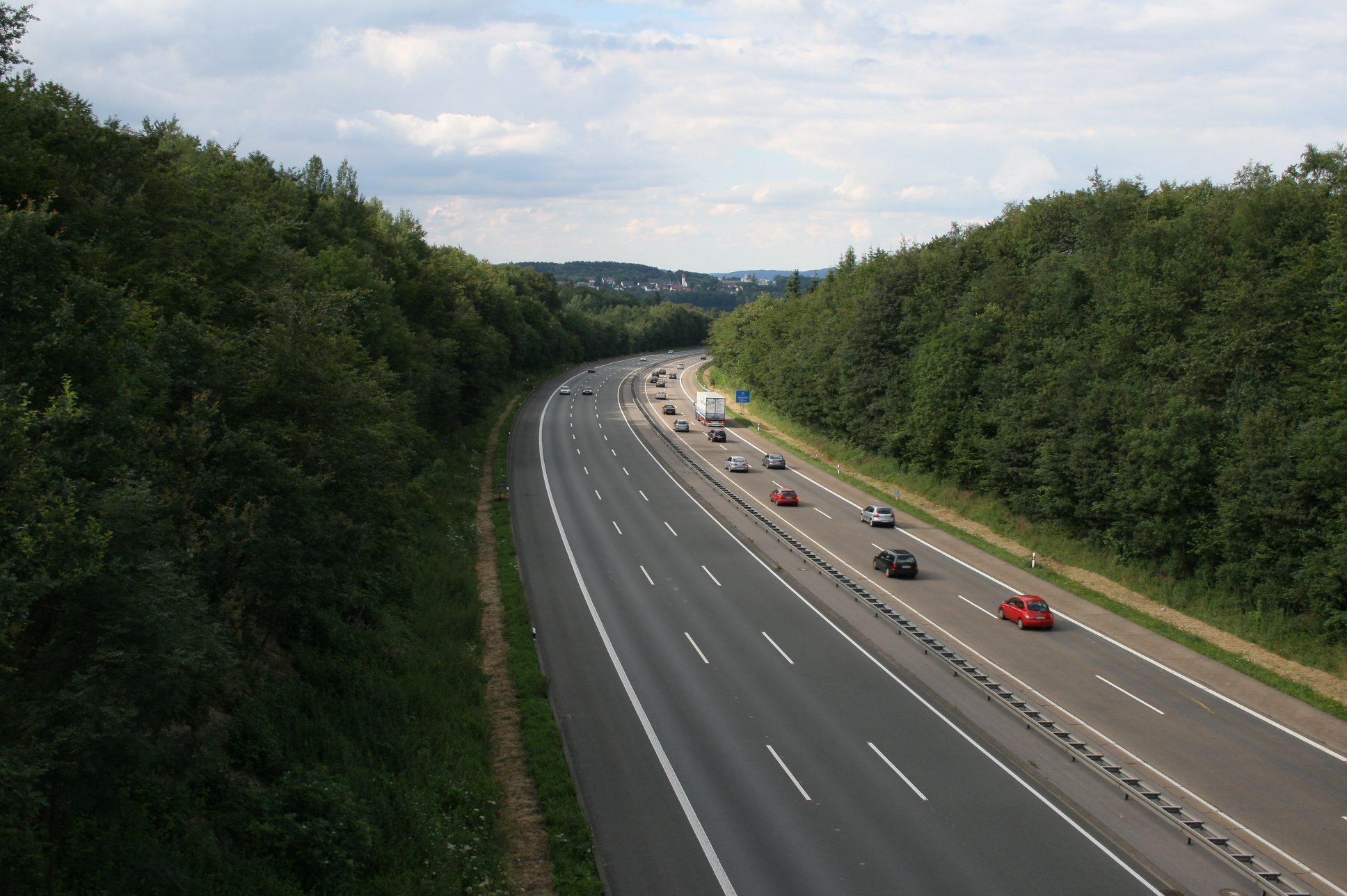 Bundesautobahn 45 bei Lüdenscheid am Homert, Blick- und Fahrtrichtung Nord